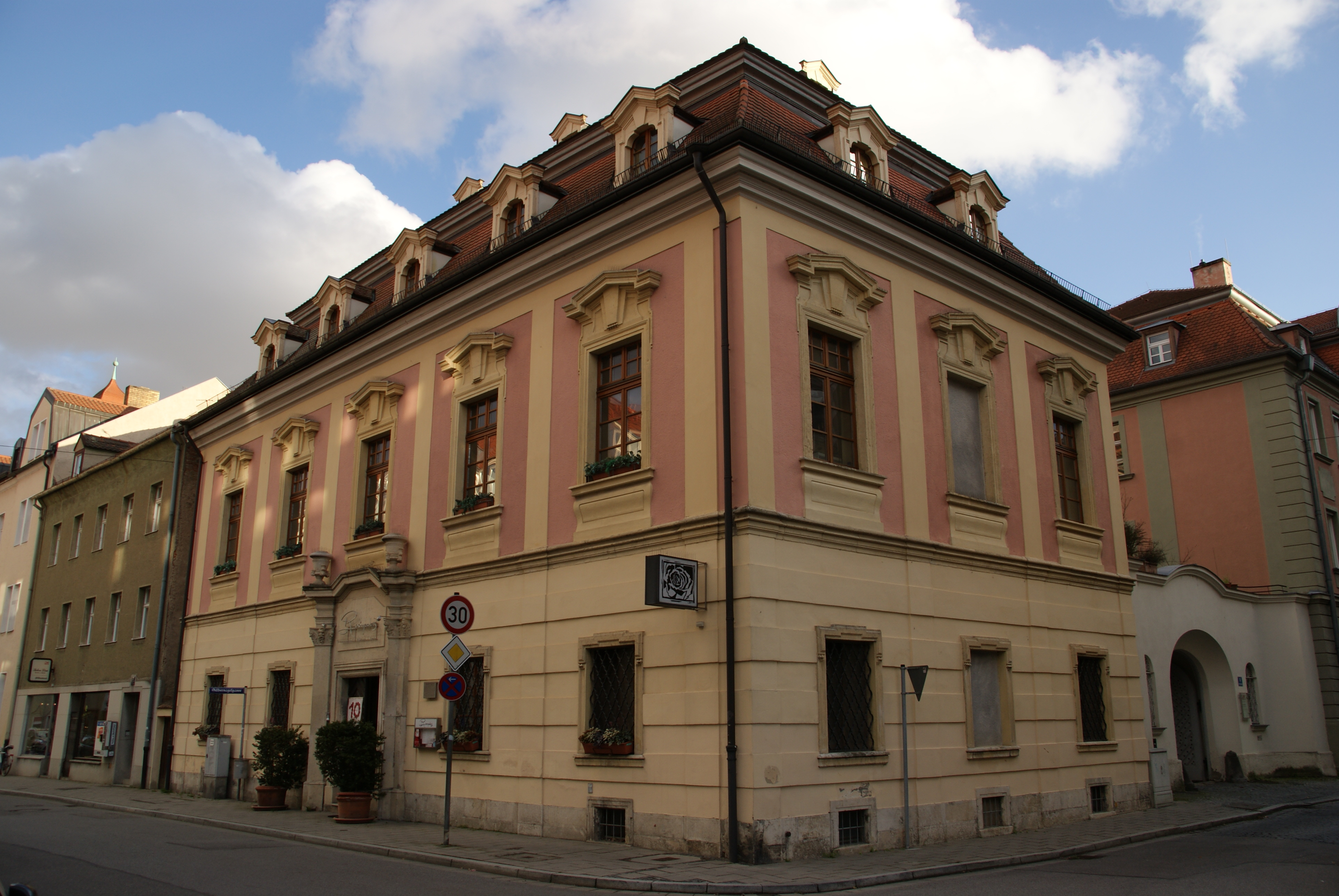 Gartenpalais Löschenkohl, um 1730-35 als Gartenvilla von Johann Michael Prunner für den Bankier Löschenkohl erbaut, später Gaststätte 'Rosenwirtsgarten'